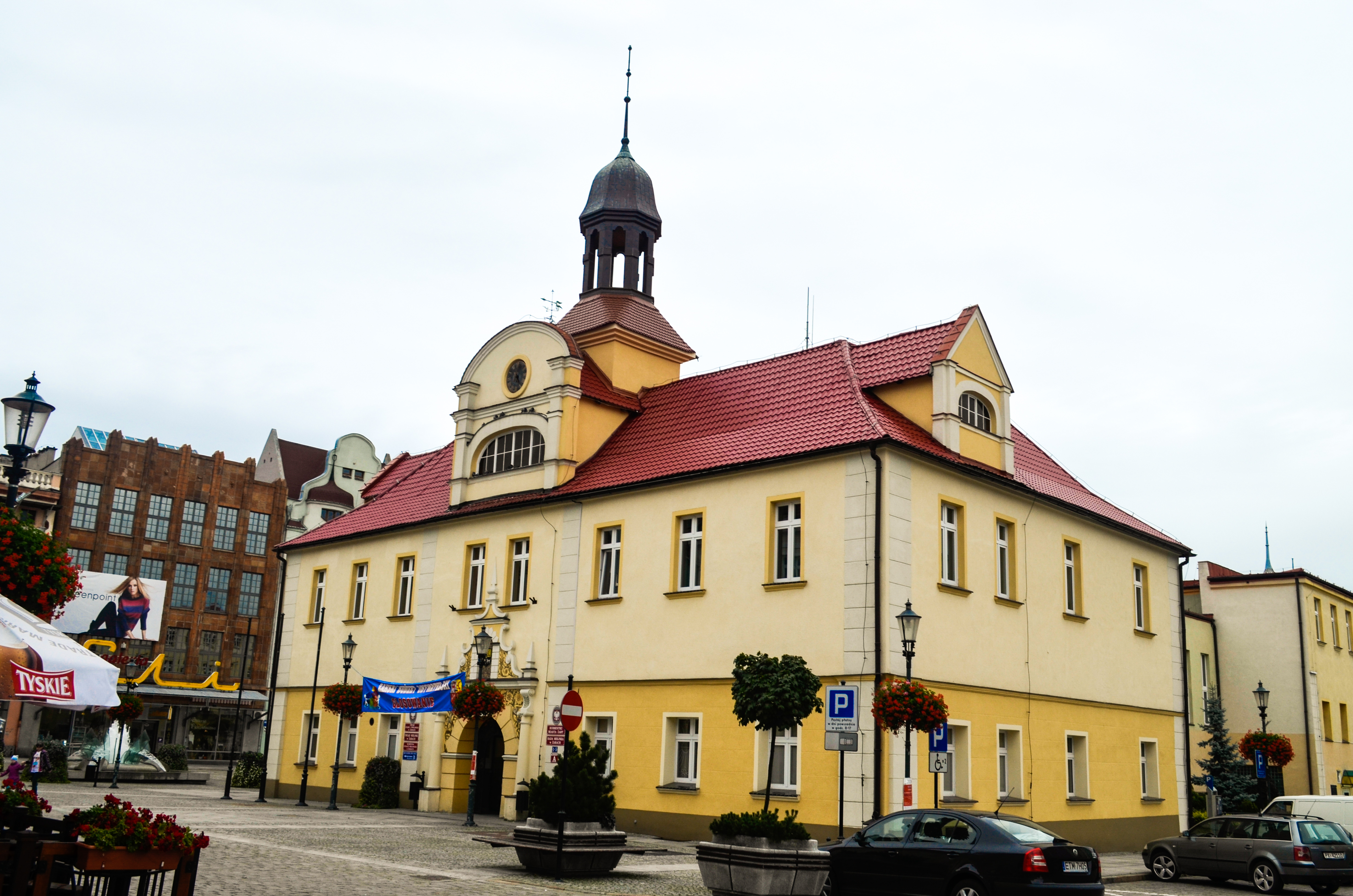 Żary, ratusz, XIV, XVI, XVIII, XX